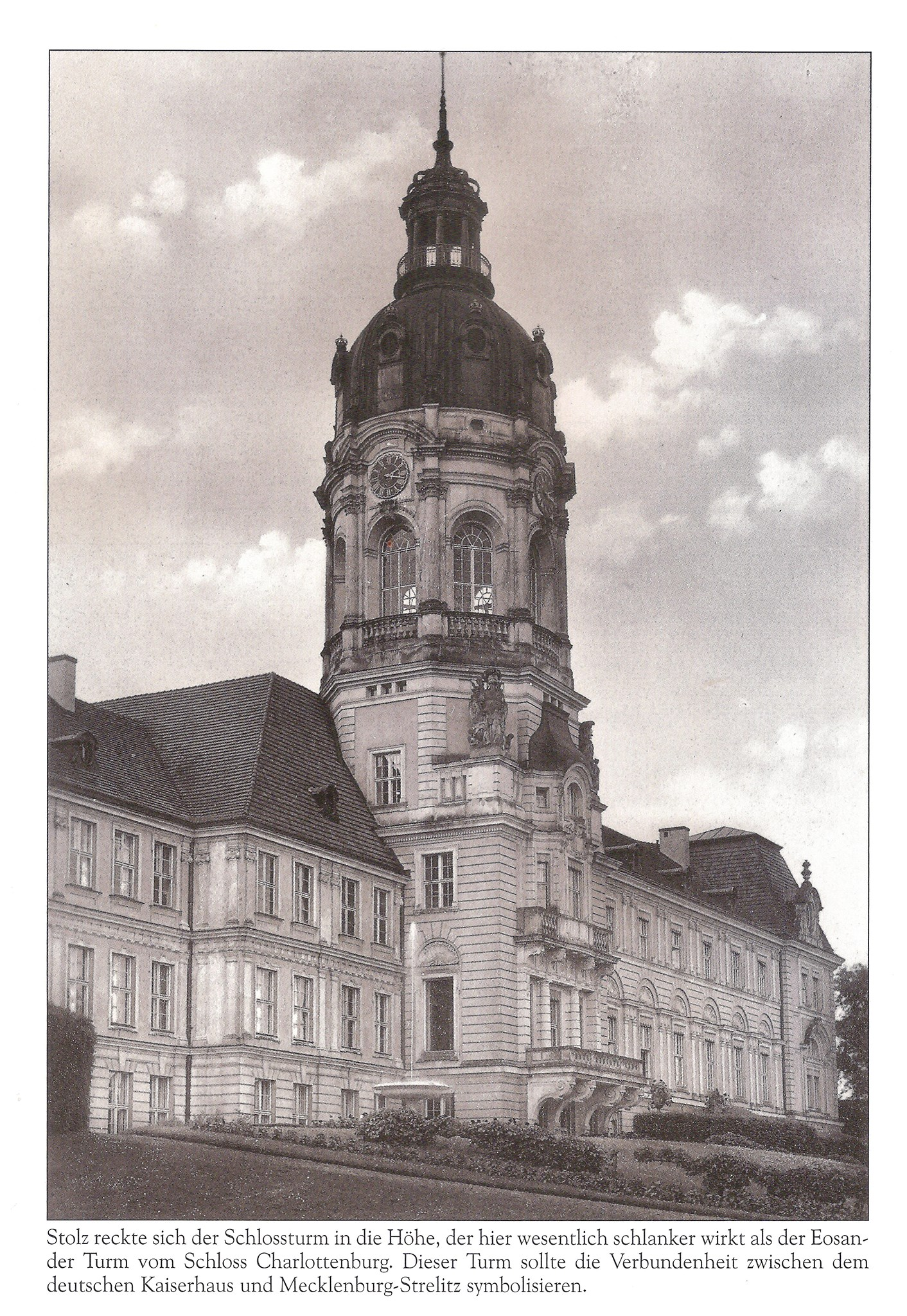 Schloss Neustrelitz Turm um 1920